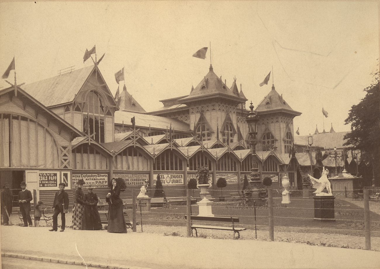 DIG91434 Industriutställningens byggnad i Götebrog vid Exercisheden den 21 november 1891. The Industrialexhibithion in Gothenburg, Sweden, the 21st of november in 1891. Die Industrieausstellung in Göteburg, Schweden, am 21.11.1891. Photo: Axel Lindahl, 1891